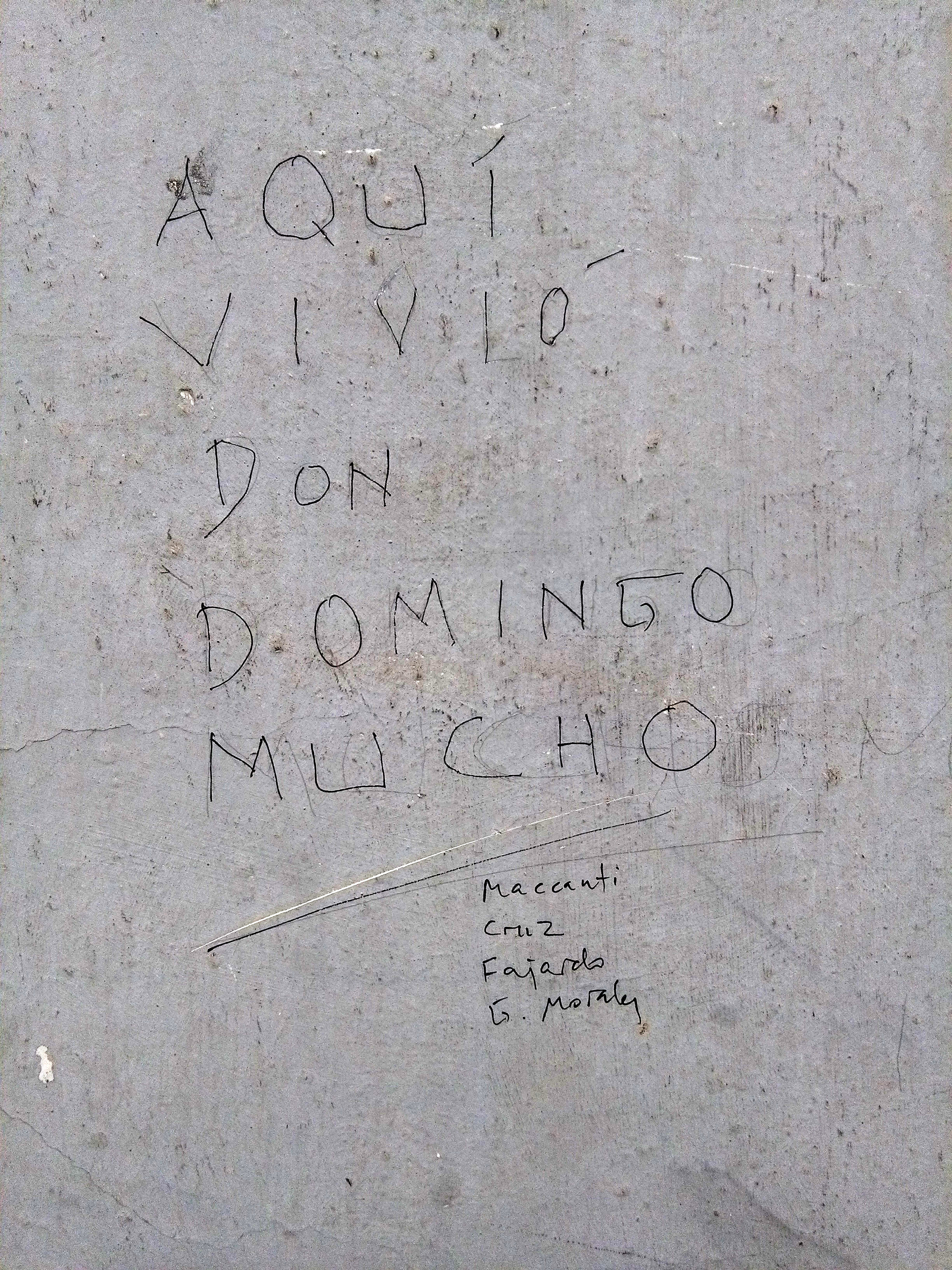 Graffiti en la residencia del escritor Domingo Pérez Minik en la antigua C/ General Goded. Santa Cruz de Tenerife, Canarias, España. Firmado por Arturo Maccanti, Juan Cruz, Jose Luis Fajardo y G. Morales.